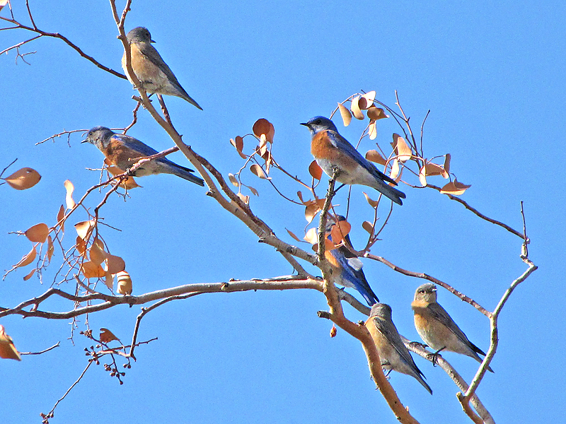 Tucson, Arizona